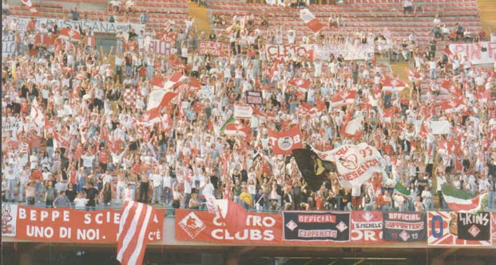 Piacentini in trasferta a Napoli per lo spareggio salvezza nella stagione1996/97